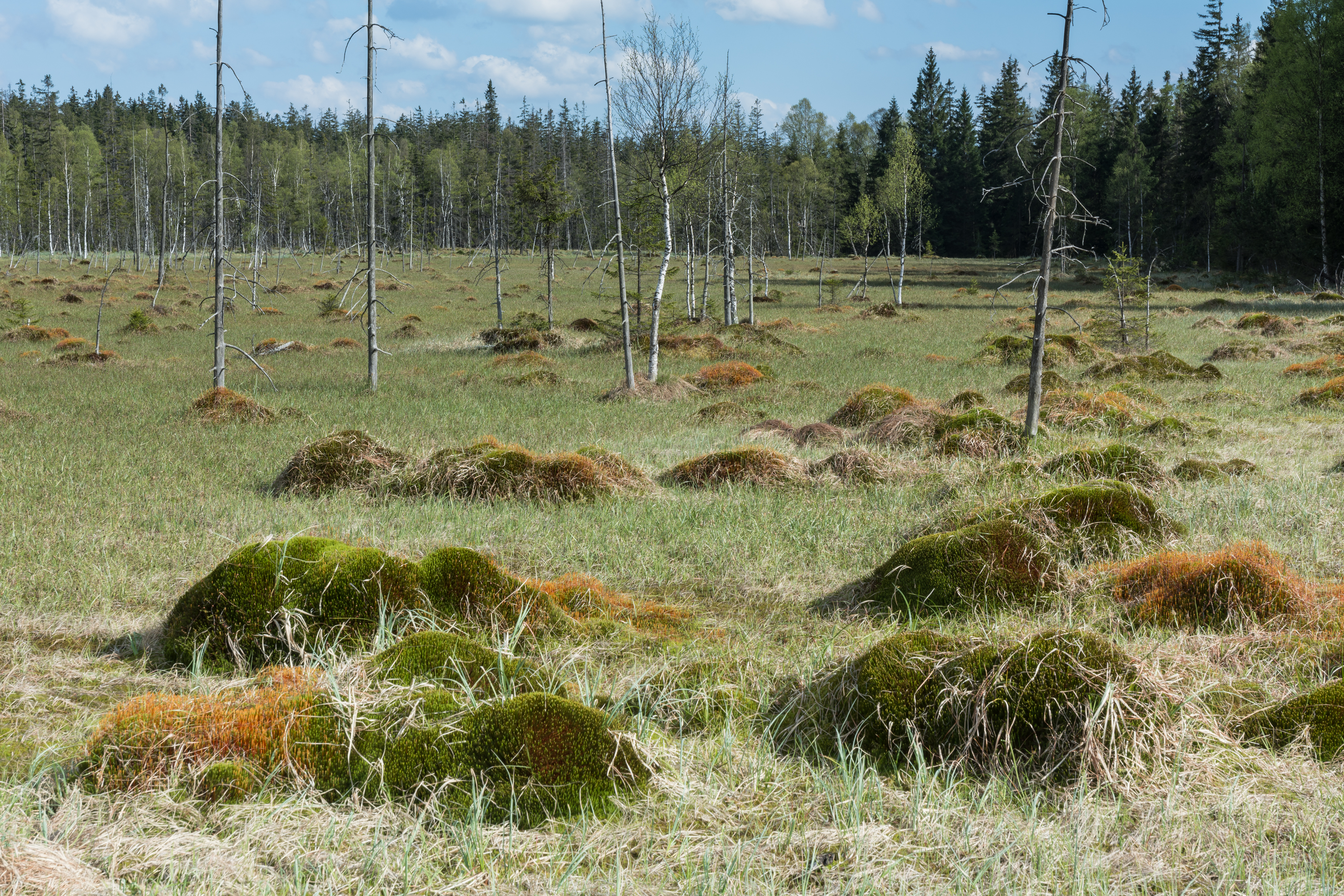 Naturschutzgebiet Torfowisko pod Zieleńcem (früher "Reinerzer Seefelder" oder "Die Seefelder"), Habelschwerdter Gebirge (Góry Bystrzyckie), Niederschlesien, Polen.